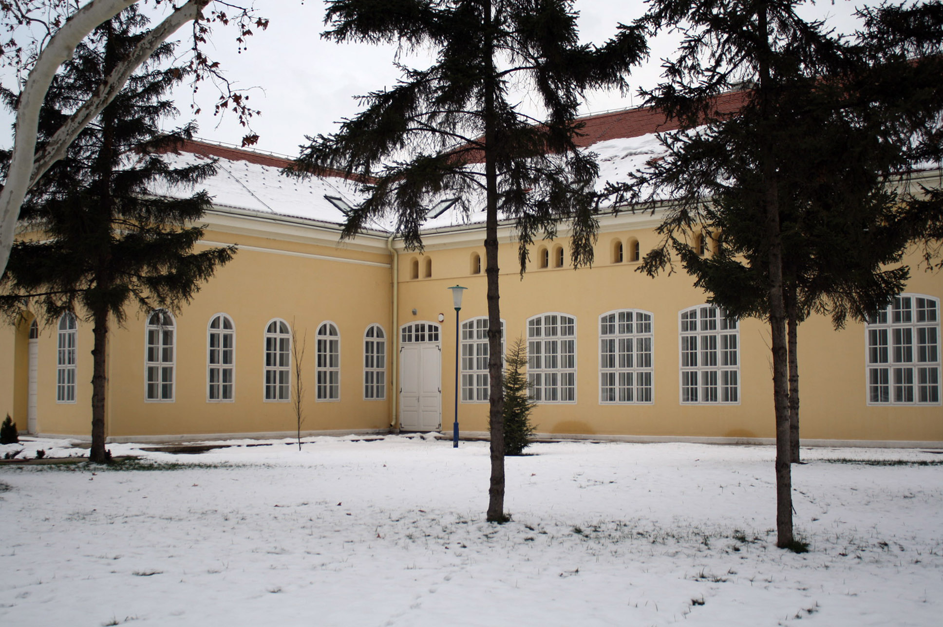 Зграда старе болнице, данас Историјског архива у Шапцу, поглед са задње стране из круга болнице.